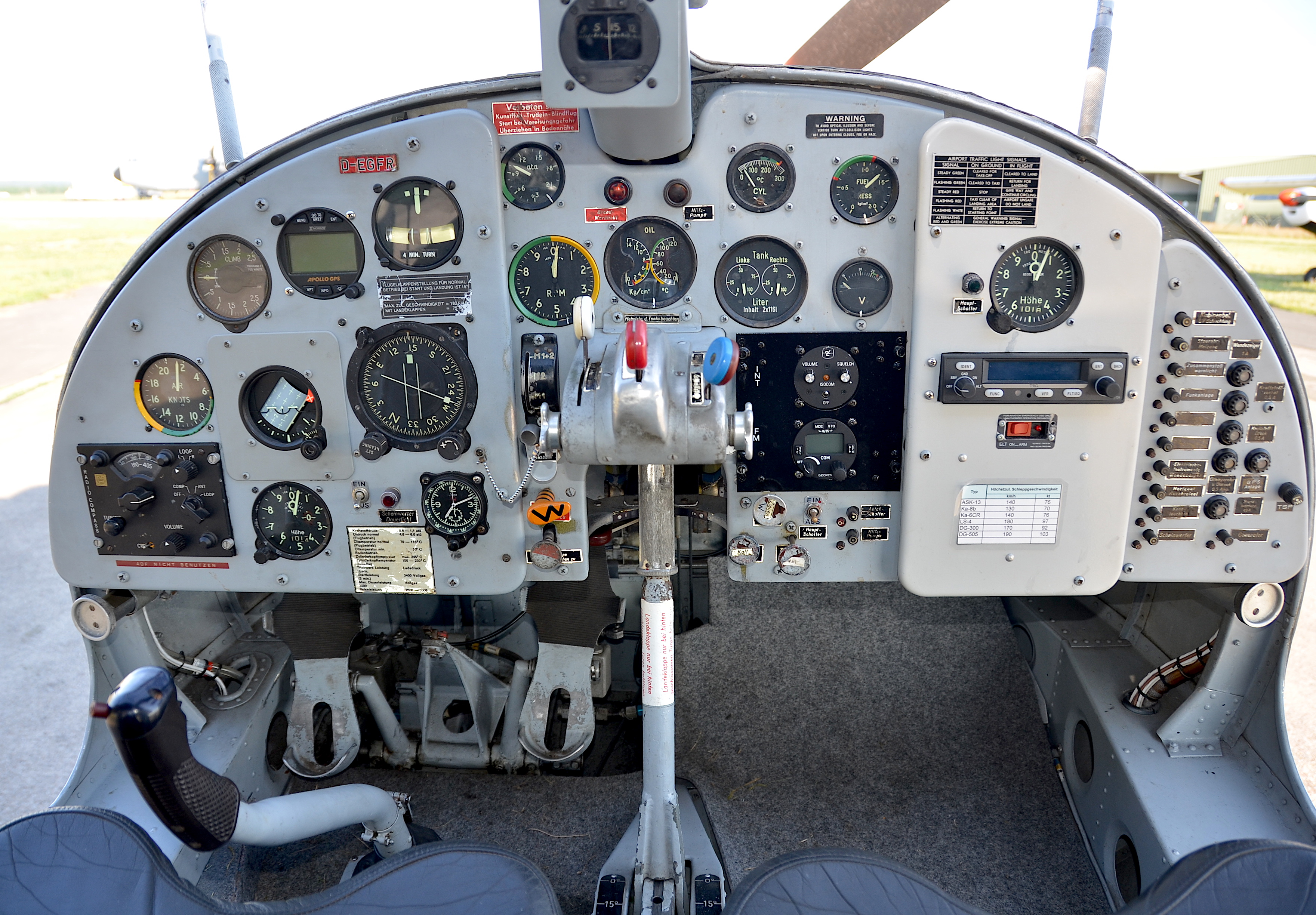 Cockpit einer Do 27-A1